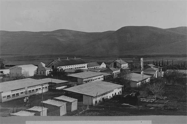 גבע - מראה